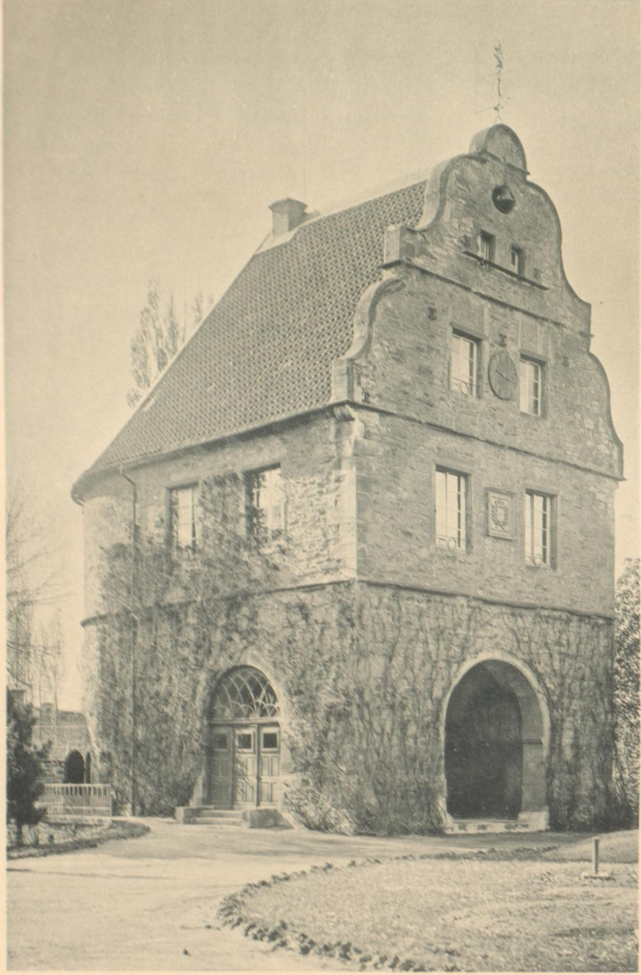 Die Vorderseite des Torhauses vom Schloss Brünninghausen um 1890.